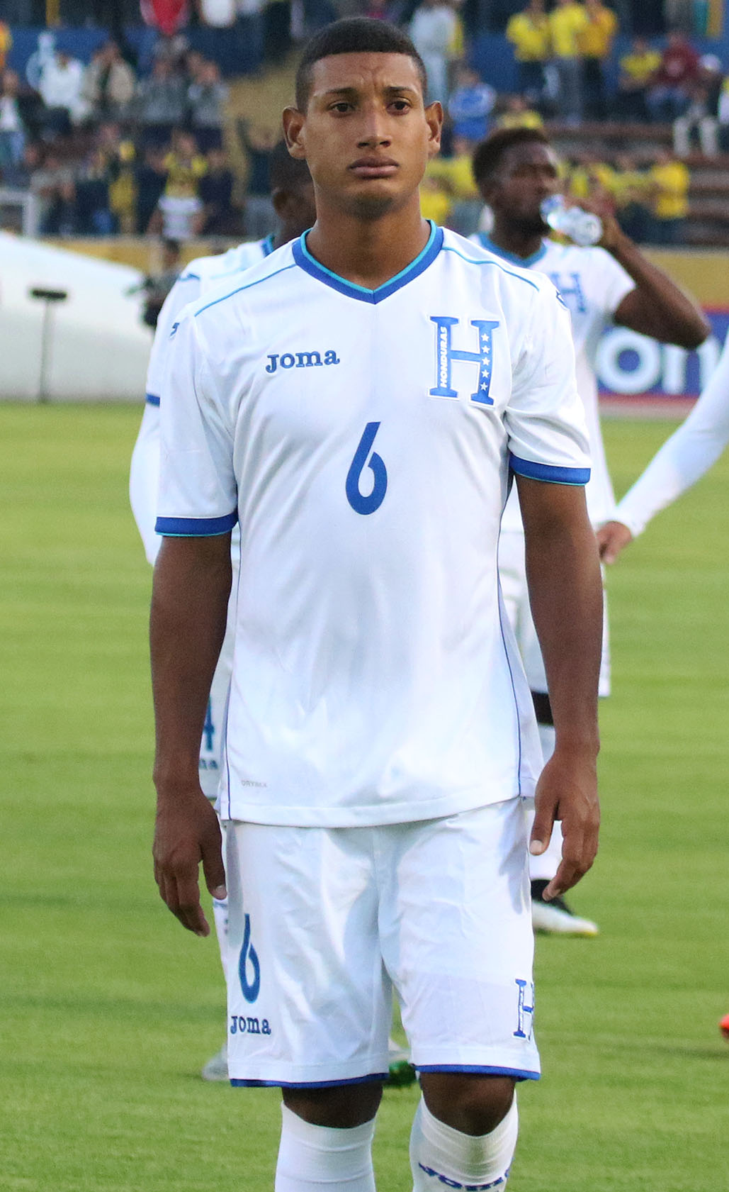 Quito, 08 de sept. (Andes).-La selección de Honduras cae ante su similar de Ecuador 0x2 en partido amistoso jugado en el estadio Olimpico Atahualpa Foto:César Muñoz/Andes